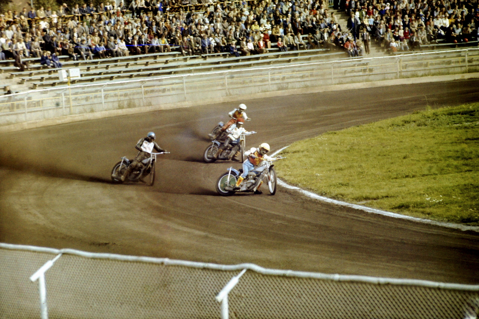 KM Ostrów Wielkopolski, po reaktywacji w 1979 r. ( zdjęcie z meczu ze Śląskiem Świętochłowice w 1980 r. )